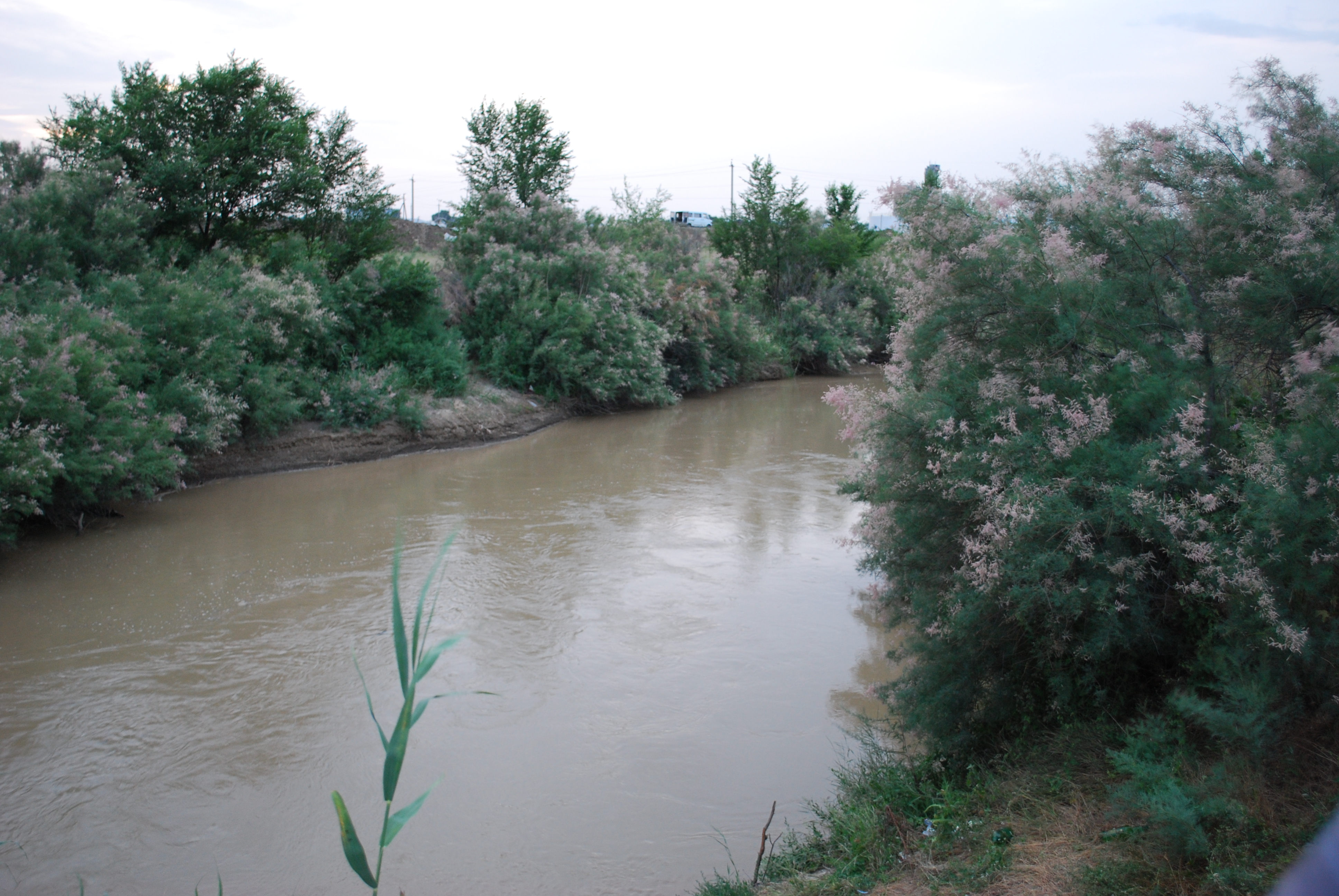 Фотография реки Калаус на улице Кавказской в Светлограде